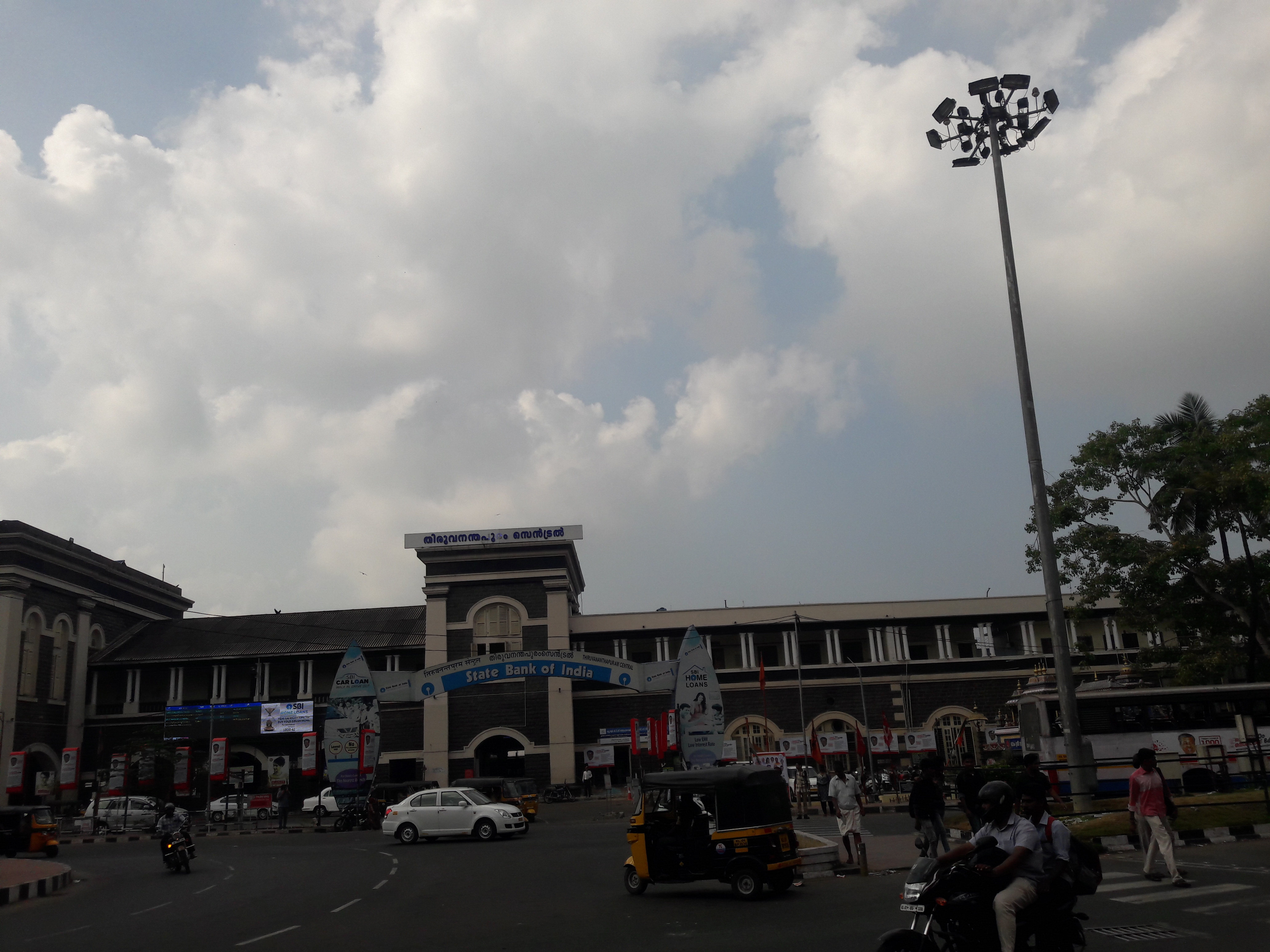 തിരുവനന്തപുരം സെൻട്രൽ തീവണ്ടിനിലയം